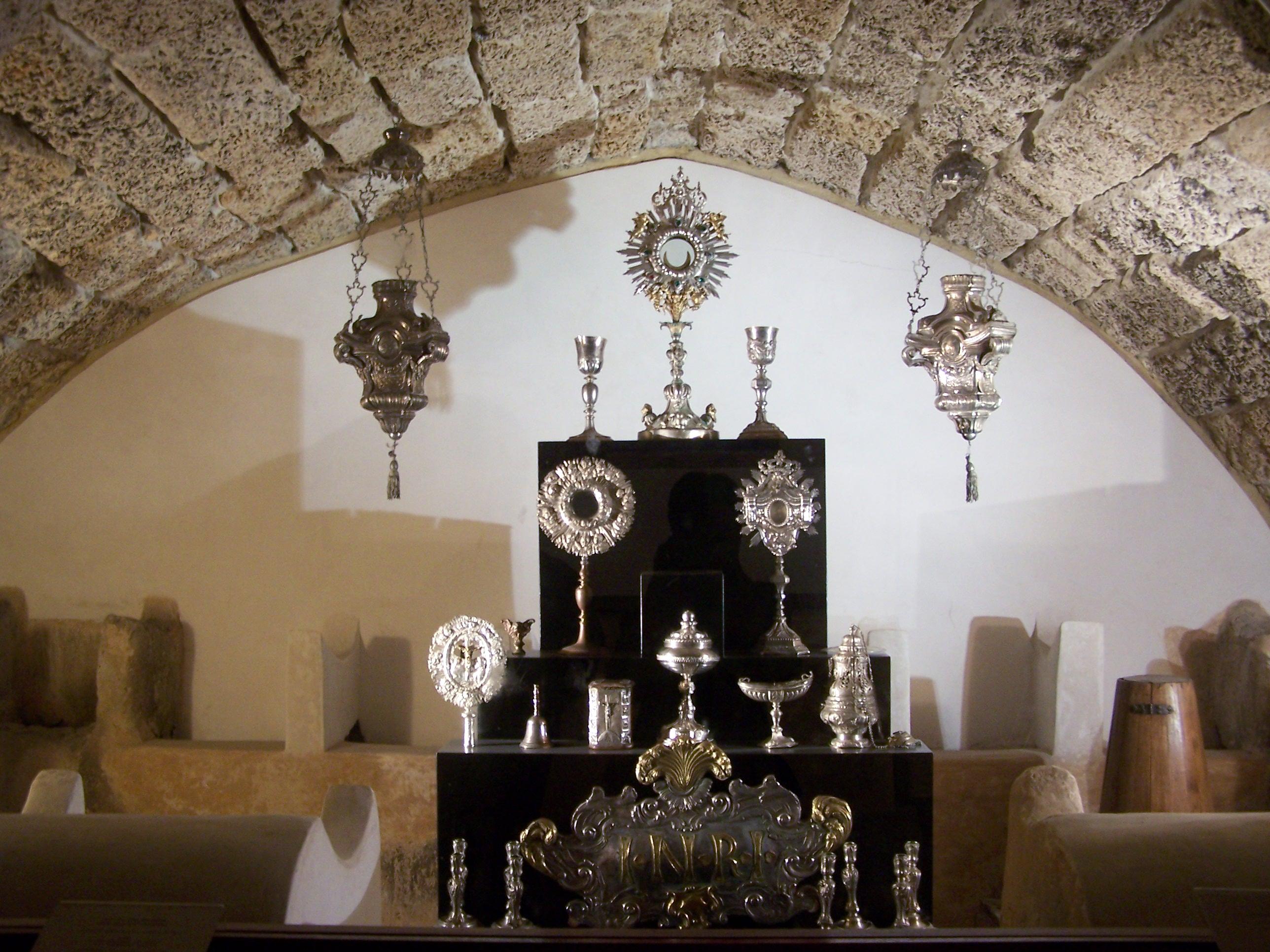 Militello. Museo d'arte sacra S. Nicolò.